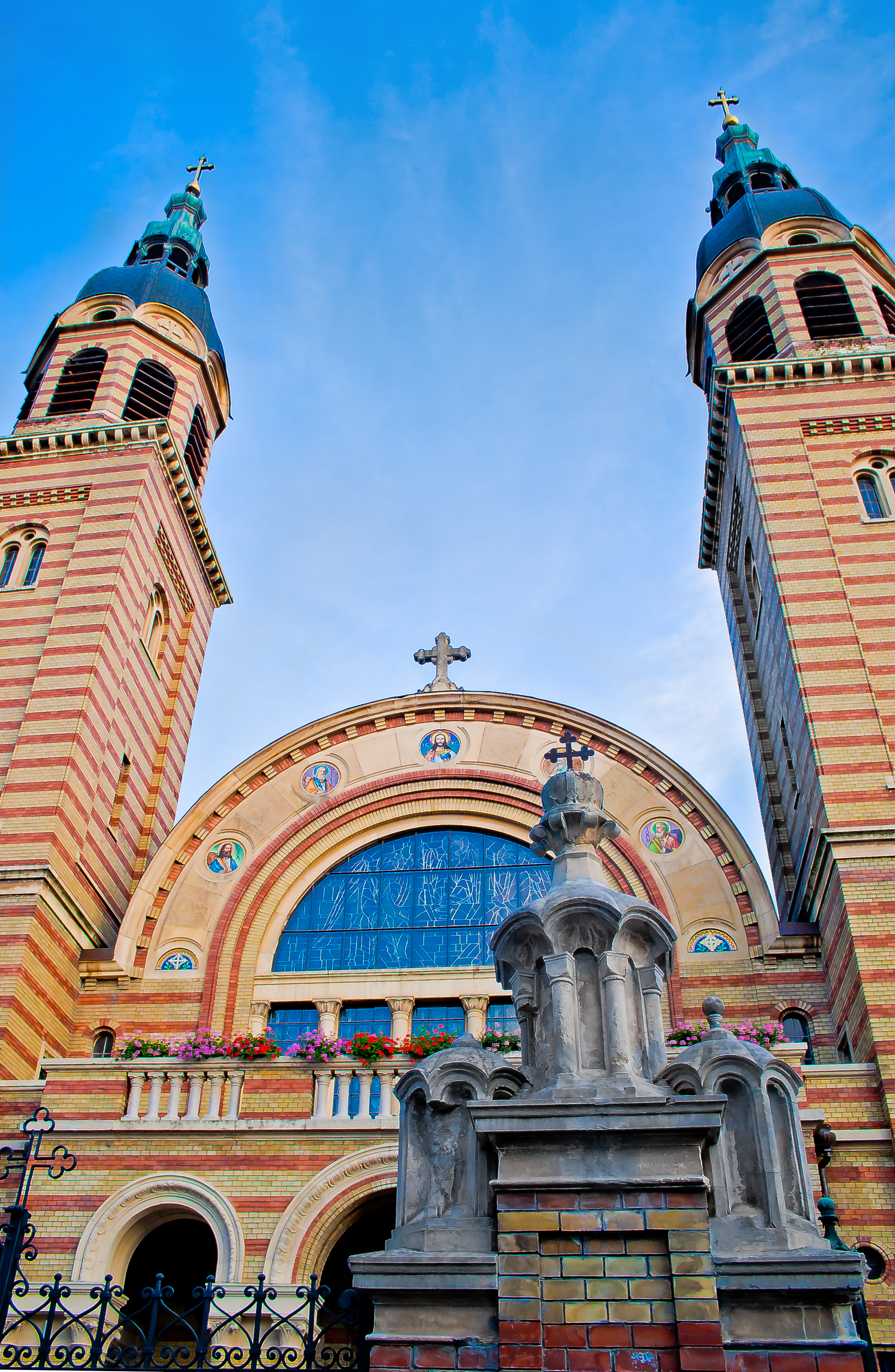 Catdrala ortodoxa Sibiu, detaliu fatada